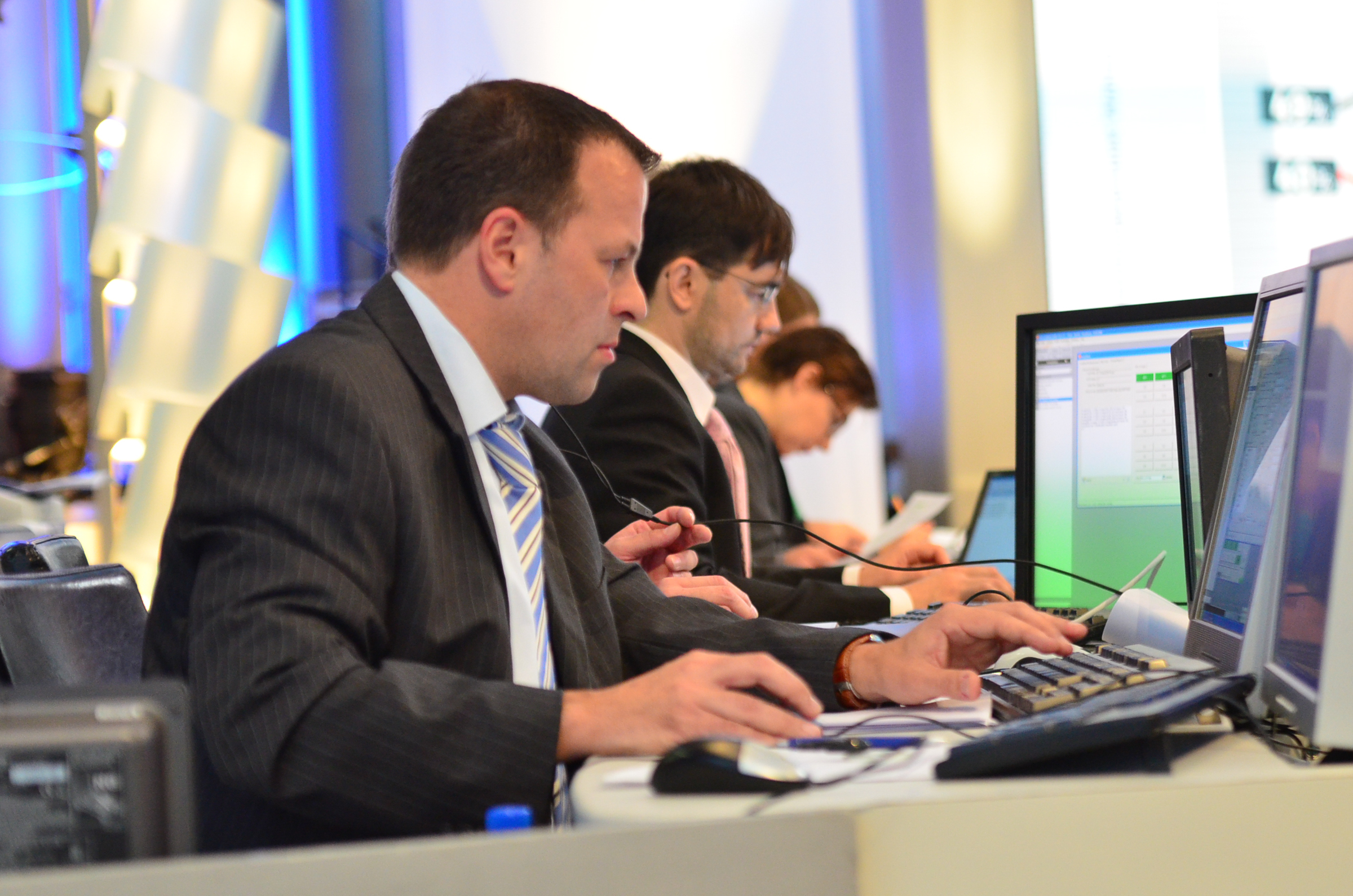 WP:Fotoprojekt zur Bundestagswahl 2013 in Berlin in den Parteizentralen und dem ZDF